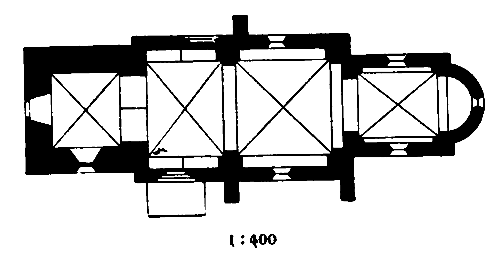 Grundriss der Ev. Kirche in Buchholz, Stadt Petershagen